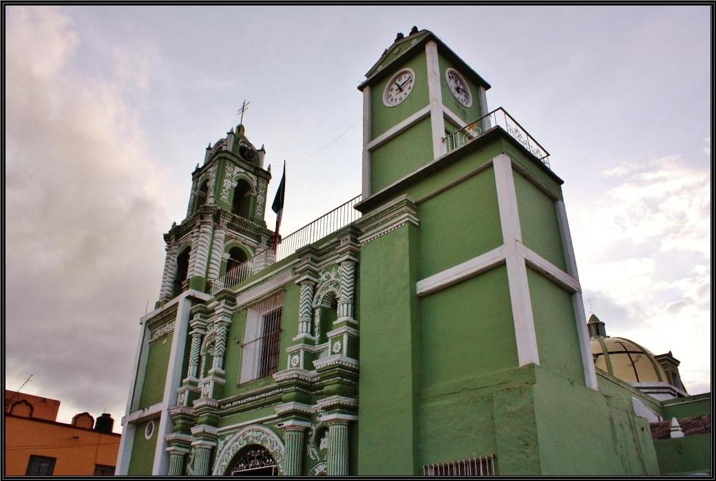 Parroquia de San Hipolito en Soltepec, Puebla, México.